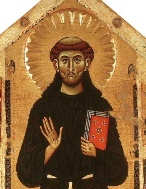 San francesco e storie della sua vita - dettaglio : San Francesco, Pistoia, Museo Civico